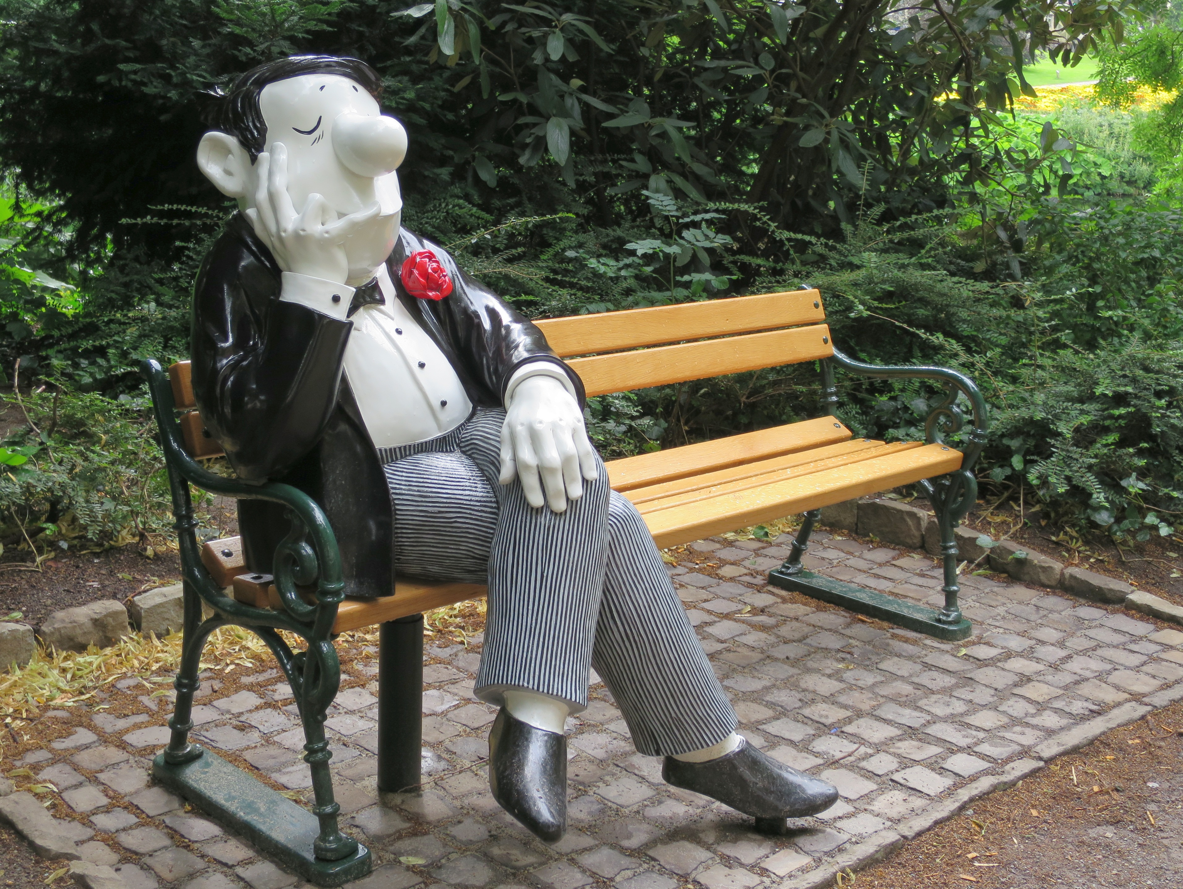 Parkbank mit Skulptur (geschaffen 2016 von Roman Strobl, bemalt von Patrick Przewloka) nach der Titelfigur von "Loriots großer Ratgeber" am Loriotplatz in Bremen